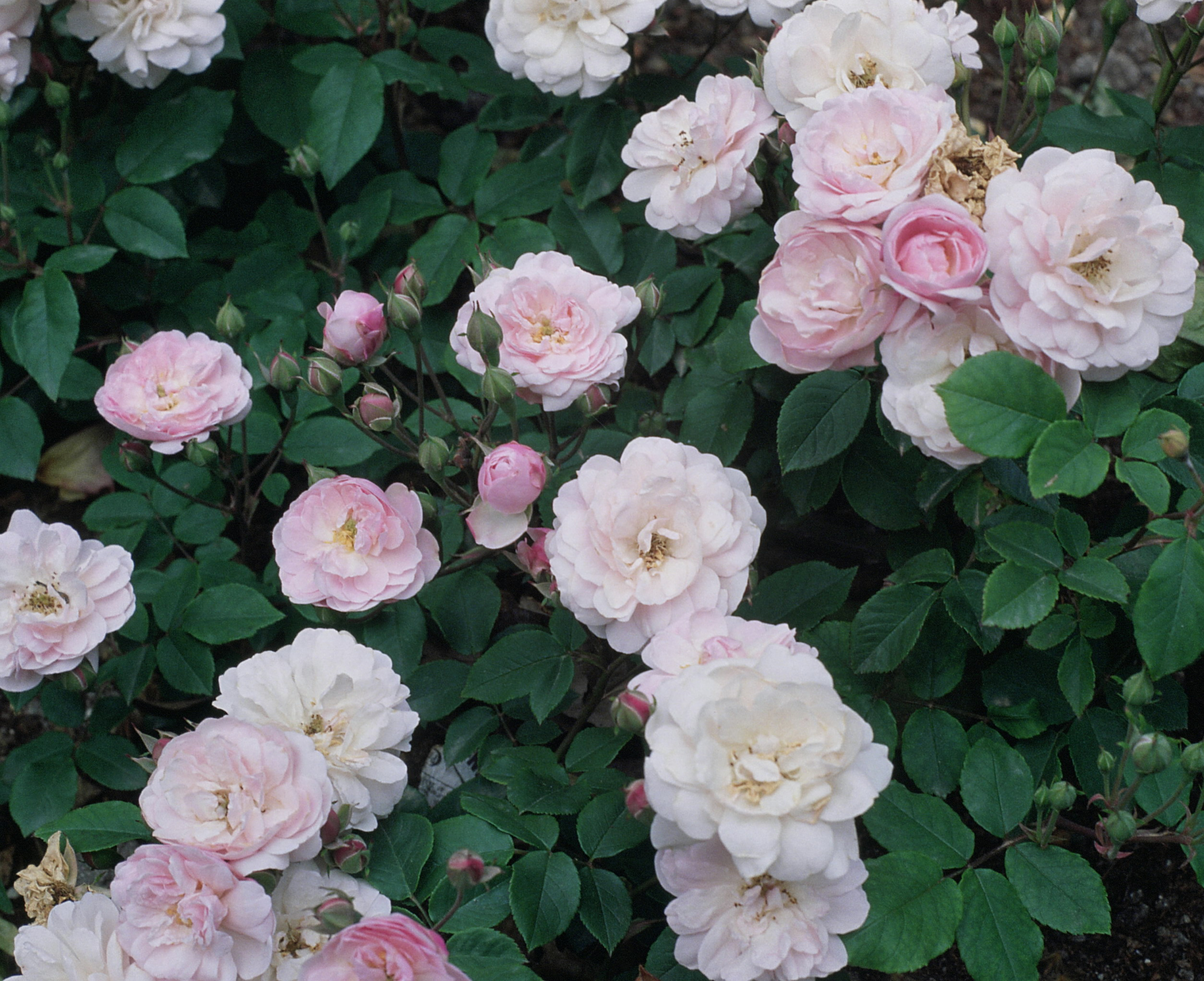 Rosa 'Blush Noisette', gr. Noisettianas, sect. Chinensis. Real Jardín Botánico, Madrid, mayo 1988, A. Barra.